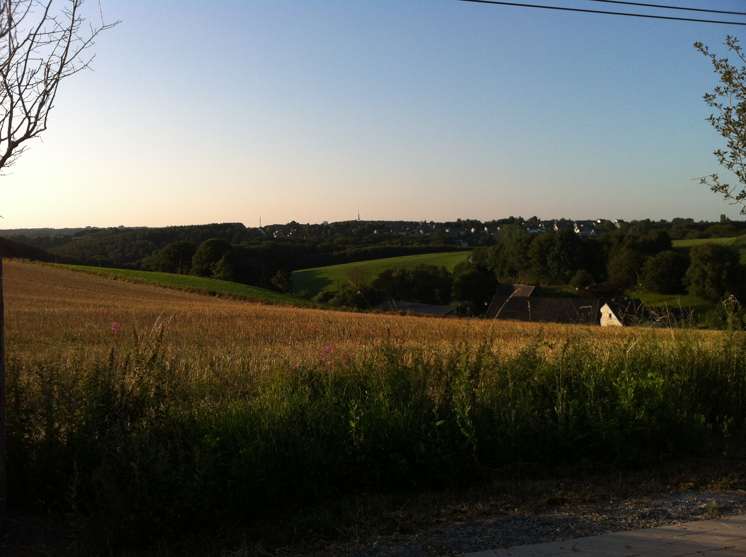 Blick auf Velbert-Tönisheide aus südöstlicher Richtung vom Panoramaradweg Niederbergbahn